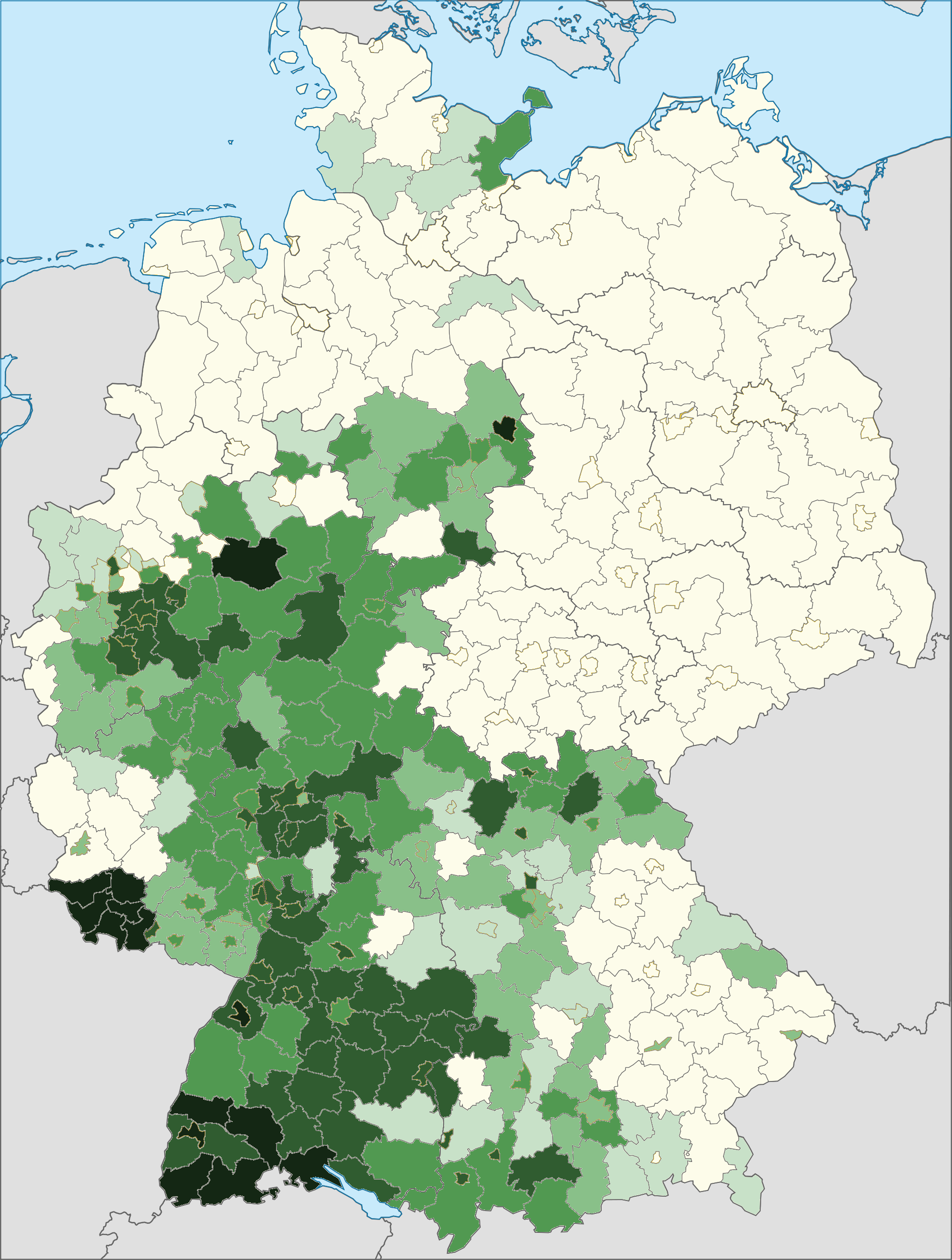 Karte der Personen mit italienischer Staatsangehörigkeit und deren relativer Häufigkeit in den Landkreisen 2014. Dunkelgrün: häufigste ausländische Staatsangehörigkeit in diesem Kreis, hellgrün: fünfthäufigste ausländische Staatsangehörigkeit in diesem Kreis, weiß: sechsthäufig oder weniger. Quelle: Ausländerzentralregister, Stand 31. Dezember 2014. Saarland: keine Daten auf Kreisebene (dargestellt ist die Landesebene). Deutschlandweite relative Häufigkeit der ausländischen Staatsangehörigkeit Italien: Platz 3.